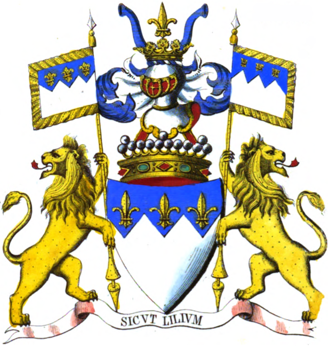 Armoiries de la famille de Robiano